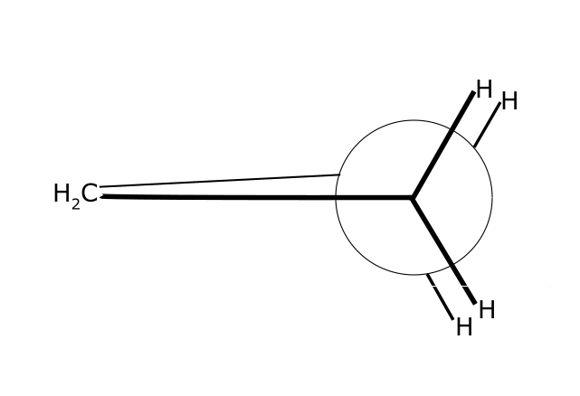 Projeção de Newman do ciclopropano mostrando a formação de eclipse entre os hidrogênios.